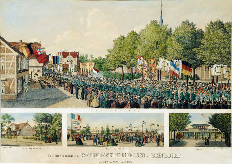 Das dritte norddeutsche Wander-Wettschiessen in Bergedorf, vom 23. bis 26. August 1863